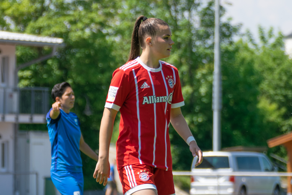 Selina Cerci vs TSV Schott Mainz